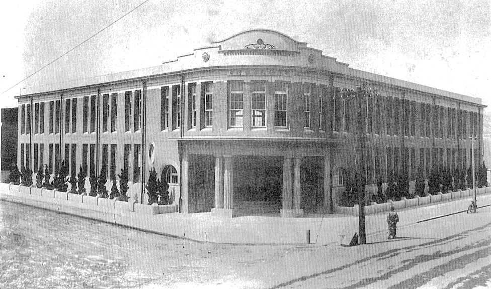 中文（台灣）: 台北南警察署，現台北市政府警察局局本部